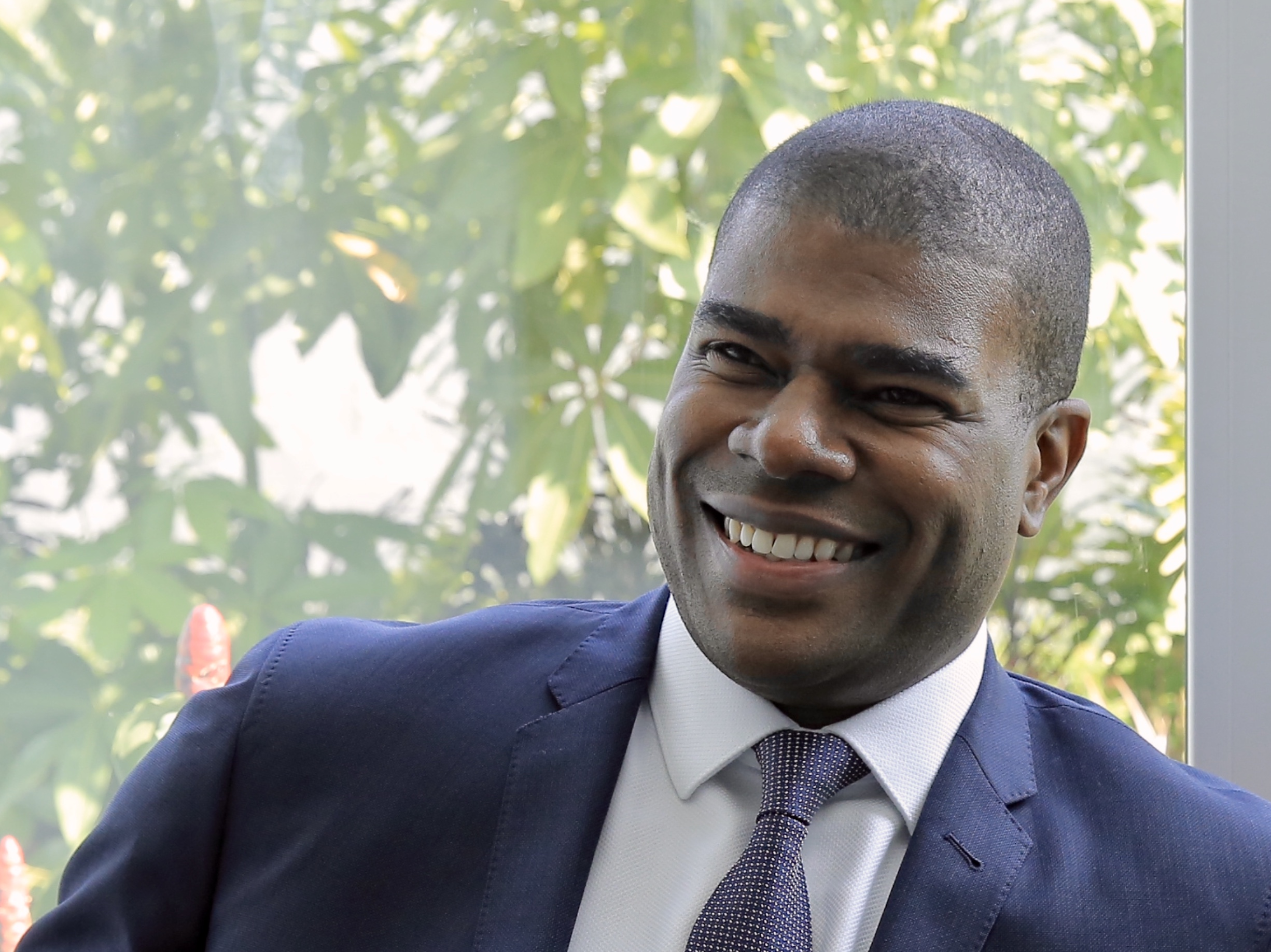 Jil-Alexandre N’Dia